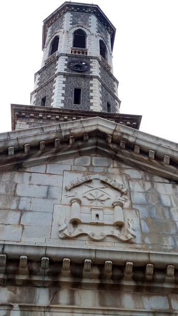 नविन राजवाडा